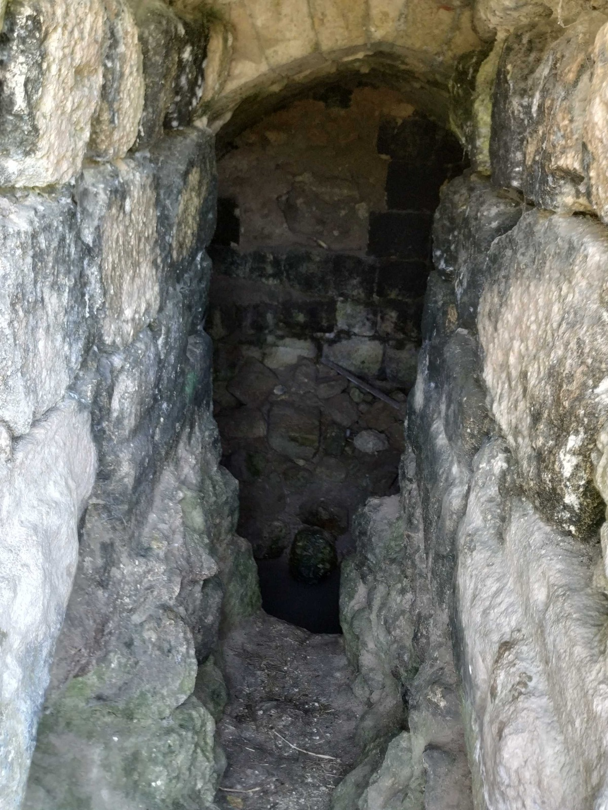 באר רומית עתיקה בתוך חורבה ביזנטית גדולה. המים בעומק כשלושים ס"מ.